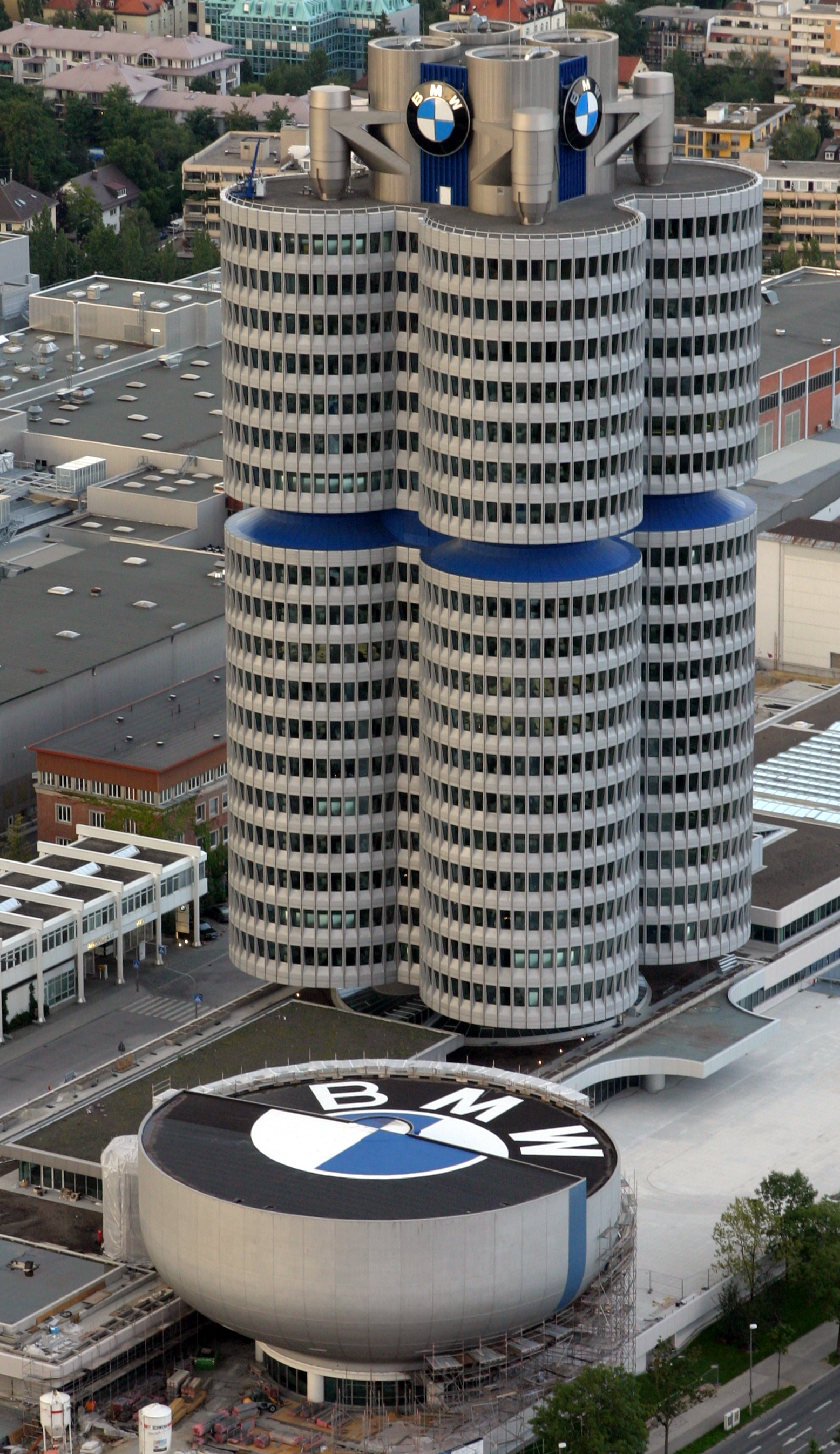 BMW Hochhaus und Museum